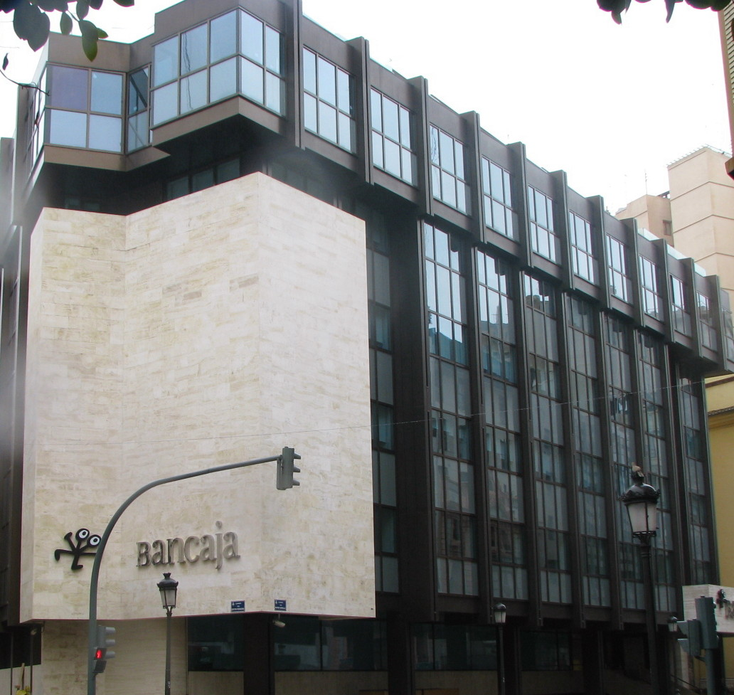 Sede central de Bancaja en Valencia (España)